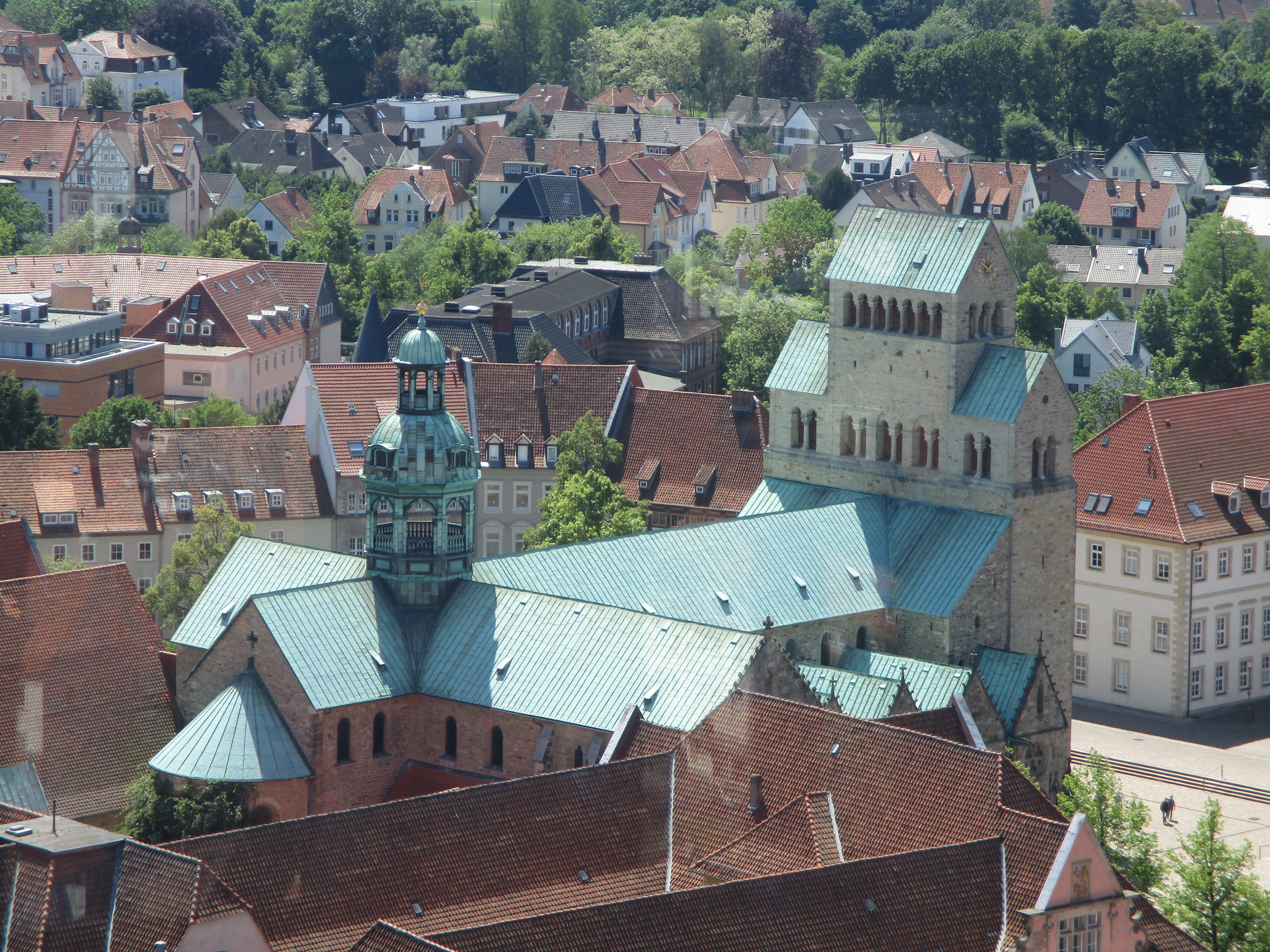 Dom in Hildesheim - fotografiert vom Kirchturm der Andreaskirche